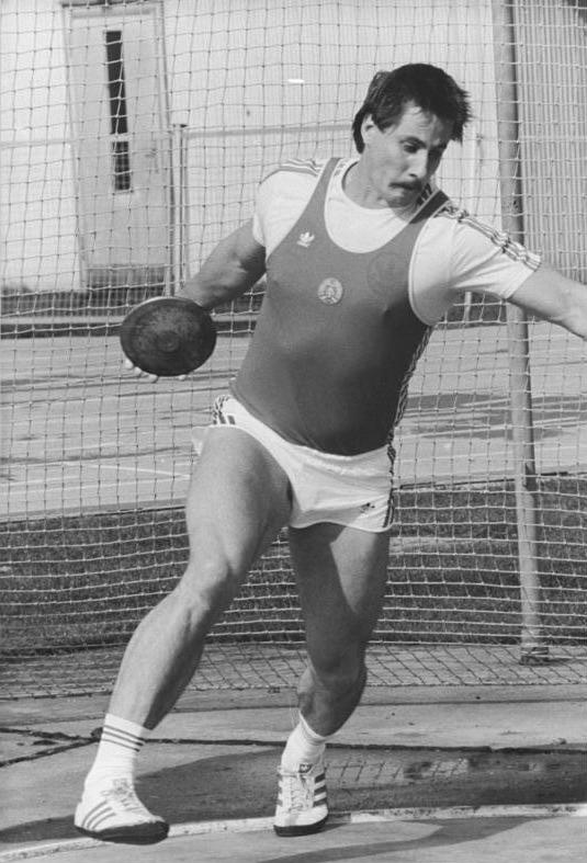 Jürgen Schult ADN-ZB Oberst 13.9.88 Berlin: Jahresweltbestleistung- Weltmeister Jürgen Schult vom SC Traktor Schwerin gelang beim Olympie-Verabschiedungsmeeting der DDR-Leichtathleten im Berliner Sportforum mit 70,46 m im zweiten Versuch erstmals in diesem Jahr eine Leistung jenseits der 70-m-Marke im Diskuswerfen